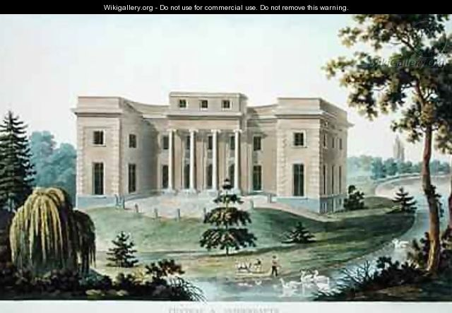 Vue de la façade d'un château à Vinderhoute près de Gand, appartenant à M. Van de Woestyn-Clemmen, extraite de Pierre-Jacques Goetghebuer, Choix des monuments, édifices et maisons les plus remarquables du Royaumes des Pays-Bas, Gand, Imprimerie de A.B. Steven, 1827, planche LXXII.